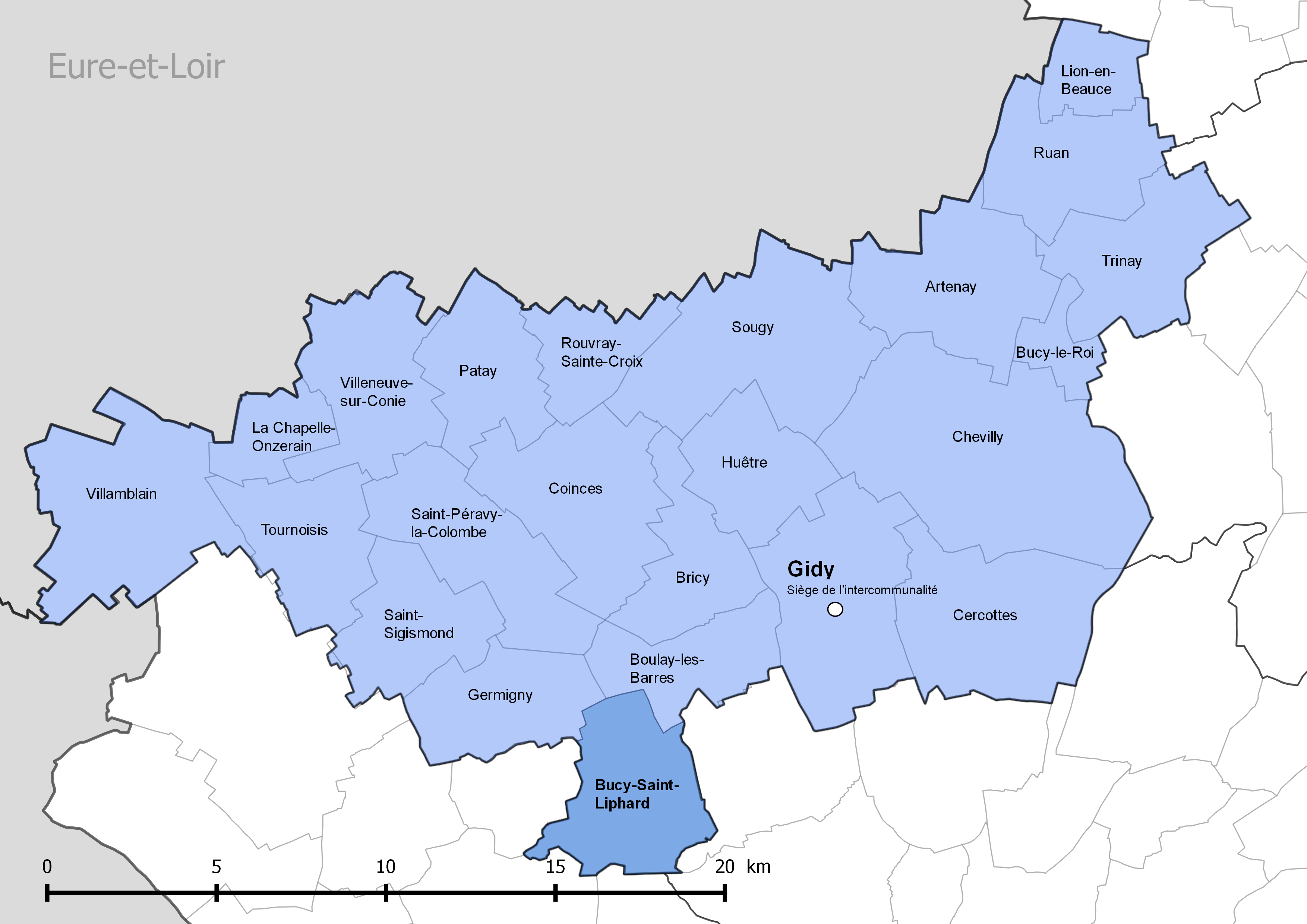 Périmètre de la communauté de communes de la Beauce loirétaine - Situation de la commune de Bucy-Saint-Liphard